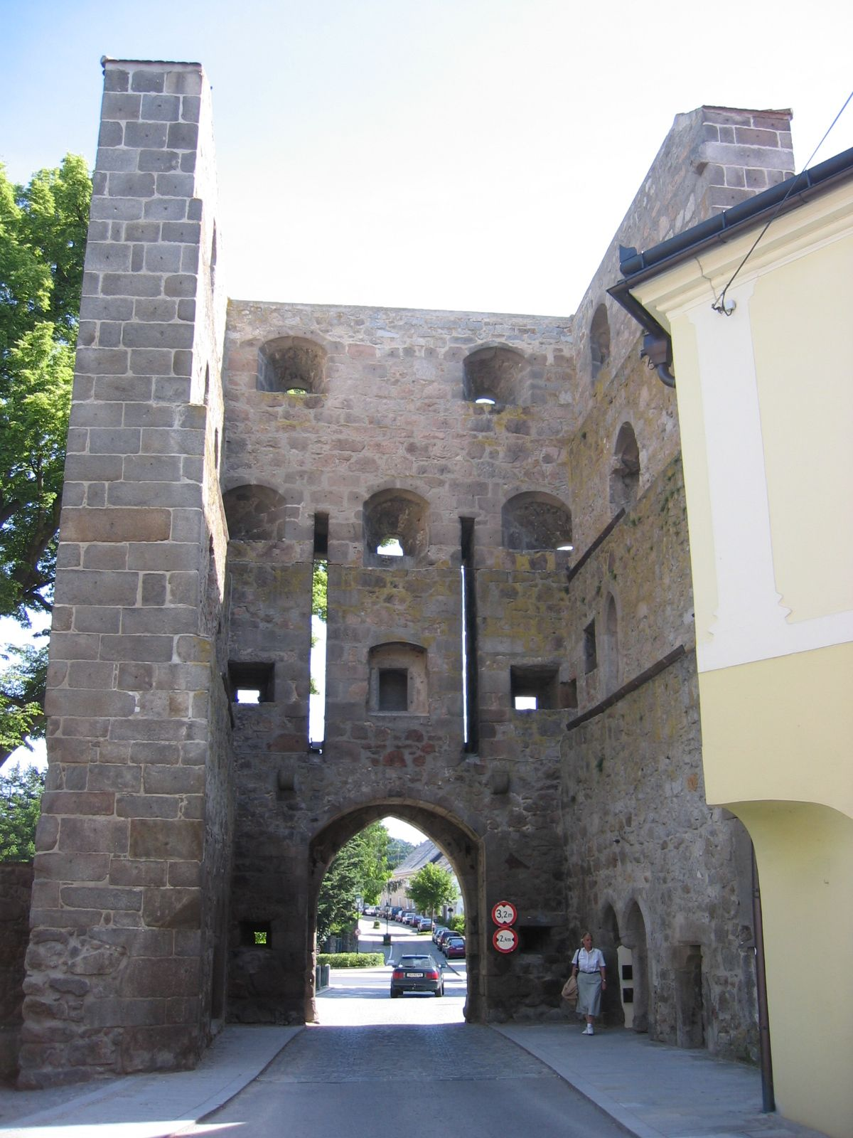 Böhmertor von innen gesehen